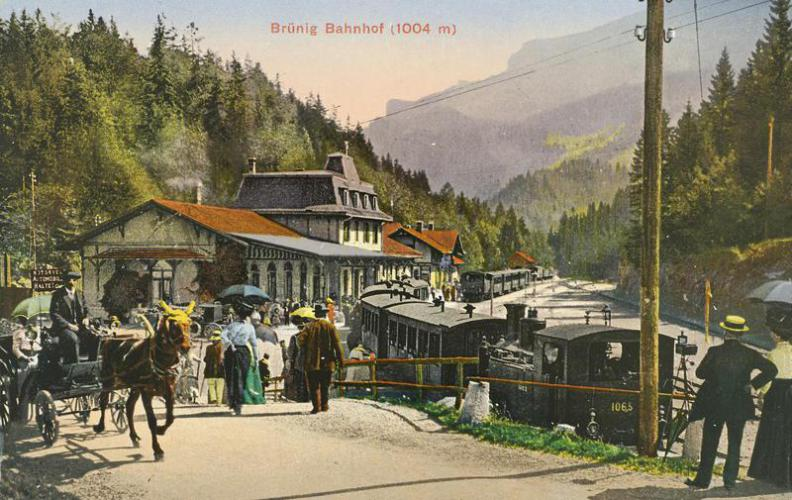 Der Bahnhof von Brünig auf dem Brünigpass um 1900